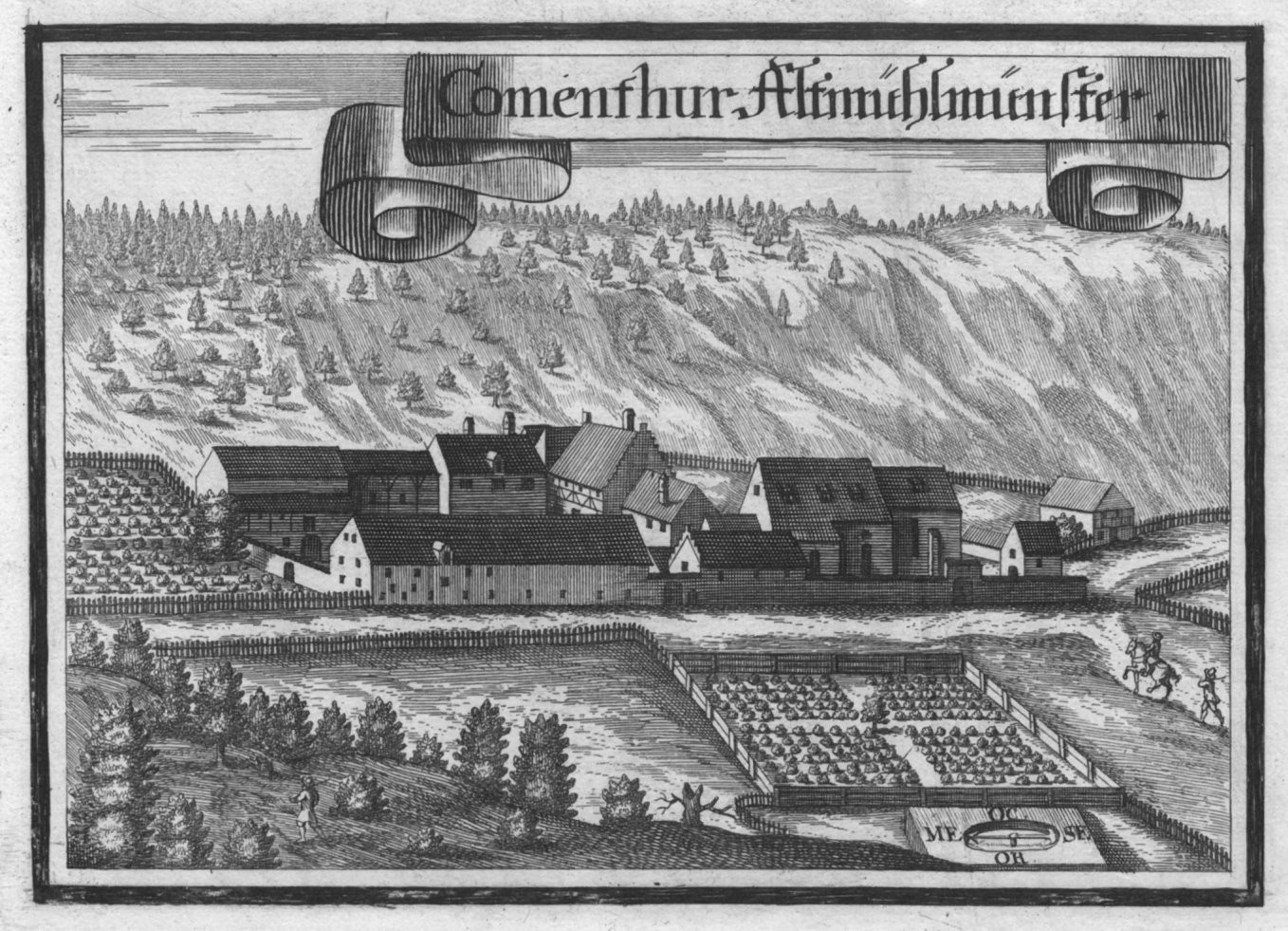 "Comenthur Altmühlmünster" - Ehemaliges Kloster in Altmühlmünster bei Riedenburg